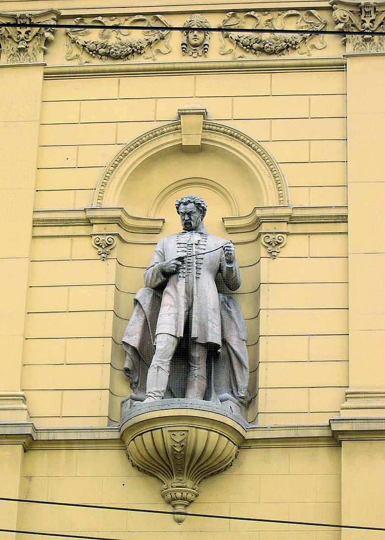 Erkel Ferenc szobra a Szegedi Nemzeti Színház homlokzatán. Tápai Antal (1902–1986) alkotása (1956)